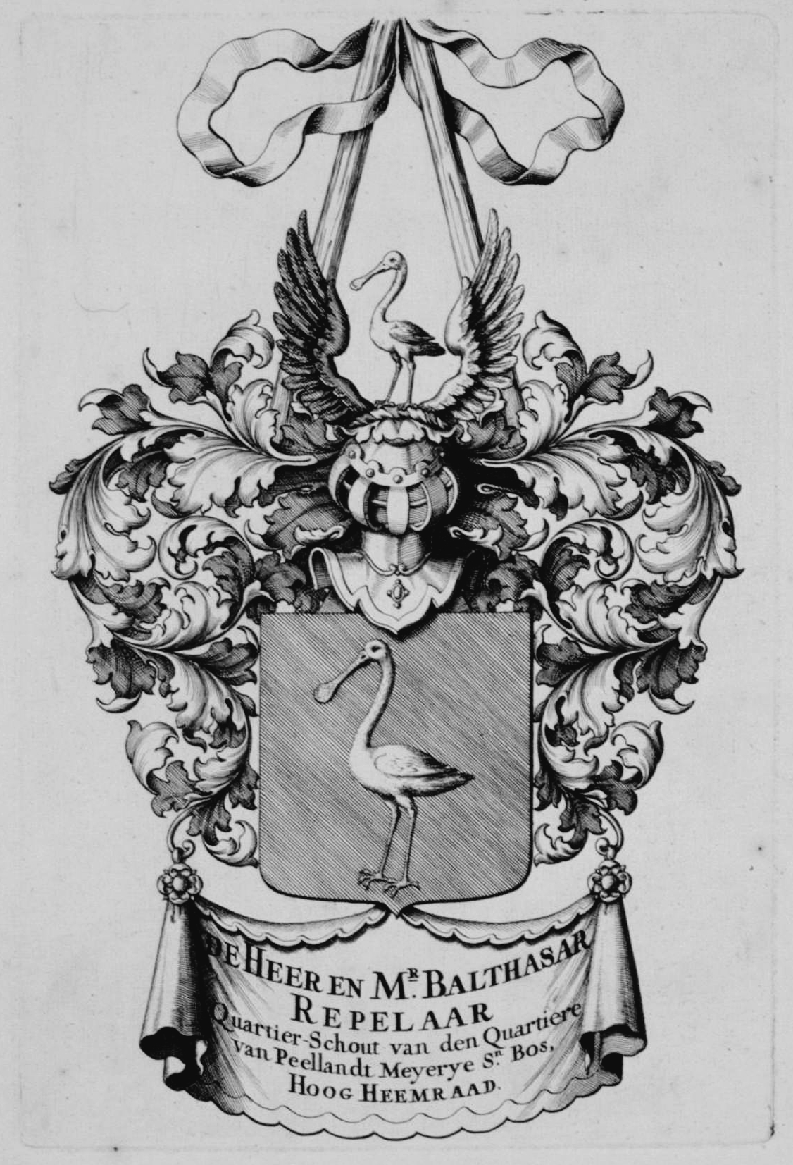 Stammwappen des Dordrechter Ratsherrengeschlechts Repelaer, vor der Nobilitierung 1816, Wapen von Balthasar Repelaer, gehörend zur Karte Alblasserwaard und Vijfheerenlanden von 1716